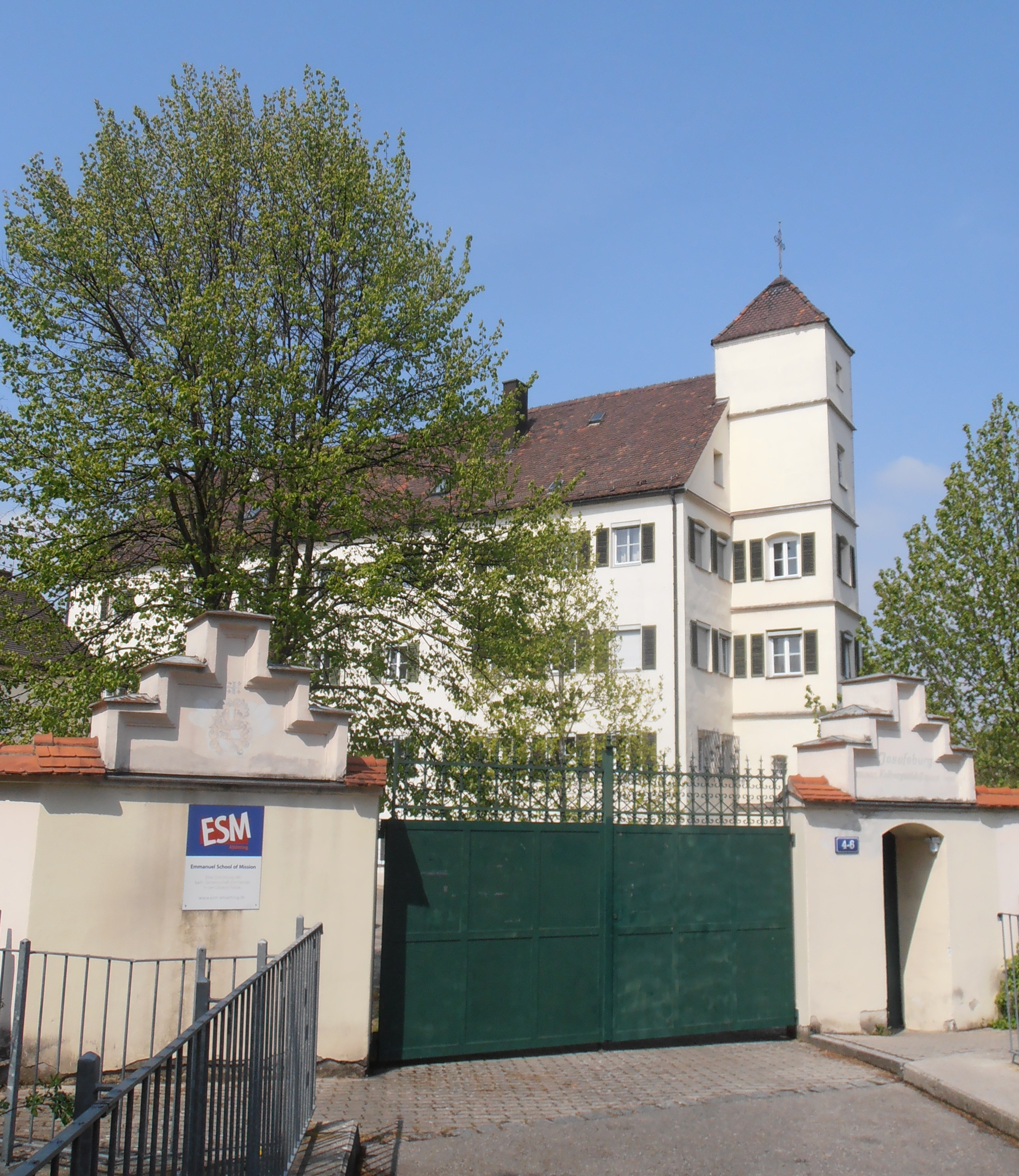 Josefsburg, auch Kolbergschlössl genannt, in Altötting